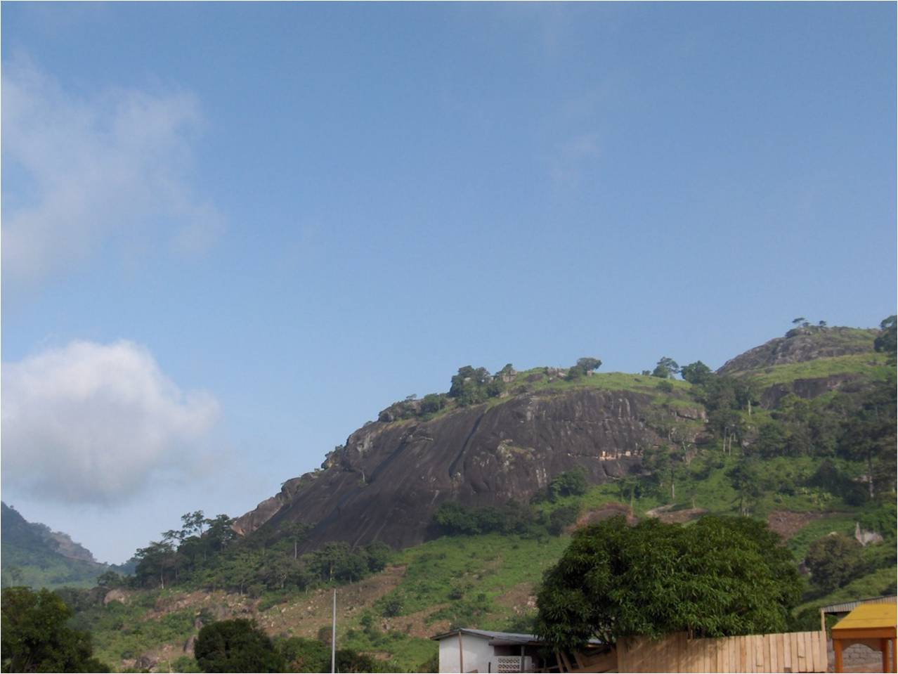 Paysage de région montagneuse (Côte d'Ivoire)